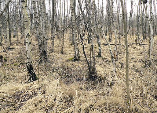 Altwarmbüchener Moor bei Hannover mit Birkenbuschwald